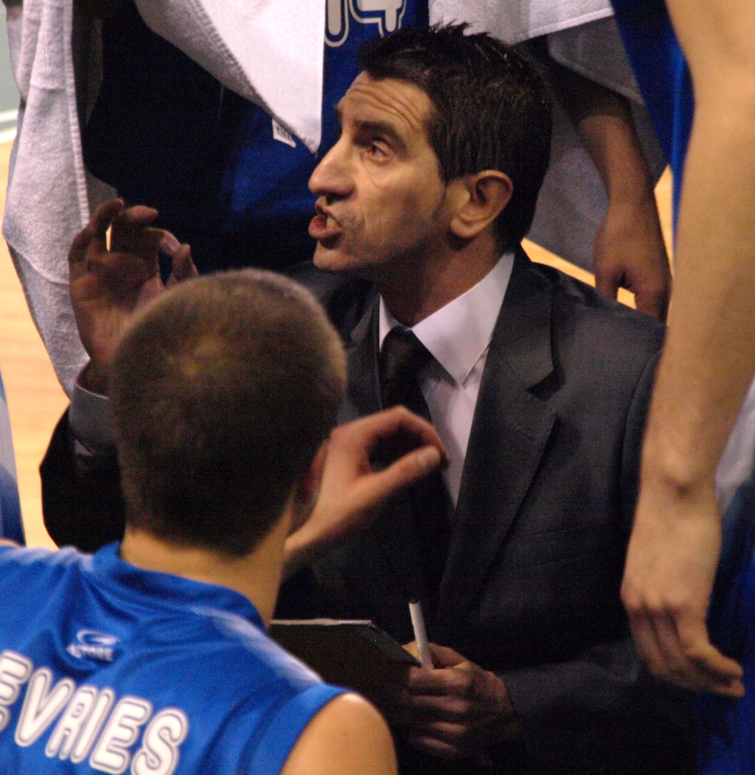 Edu Torres dando instrucciones a los jugadores del Plus Pujol Lleida durante el transcurso de un tiempo muerto del partido que enfrentó al Lleida y al Cáceres 2016 en el pabellón multiusos "Ciudad de Cáceres" de la liga LEB 2008/09